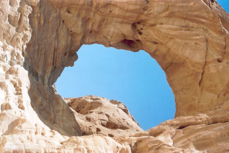 Долина Тимны. Арка